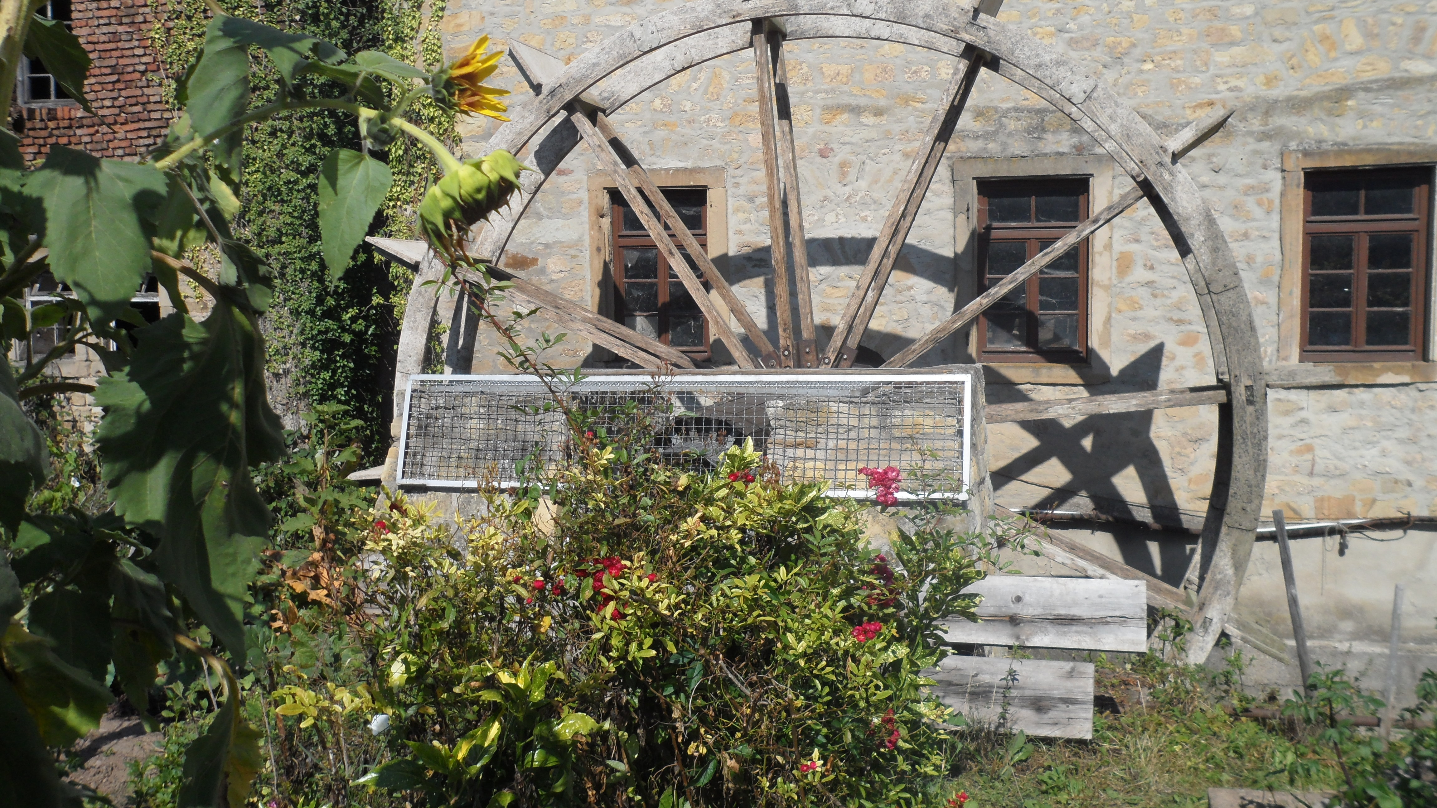 Bad Sobernheim ;ehem.Stadtmühle - das Wasserrad.